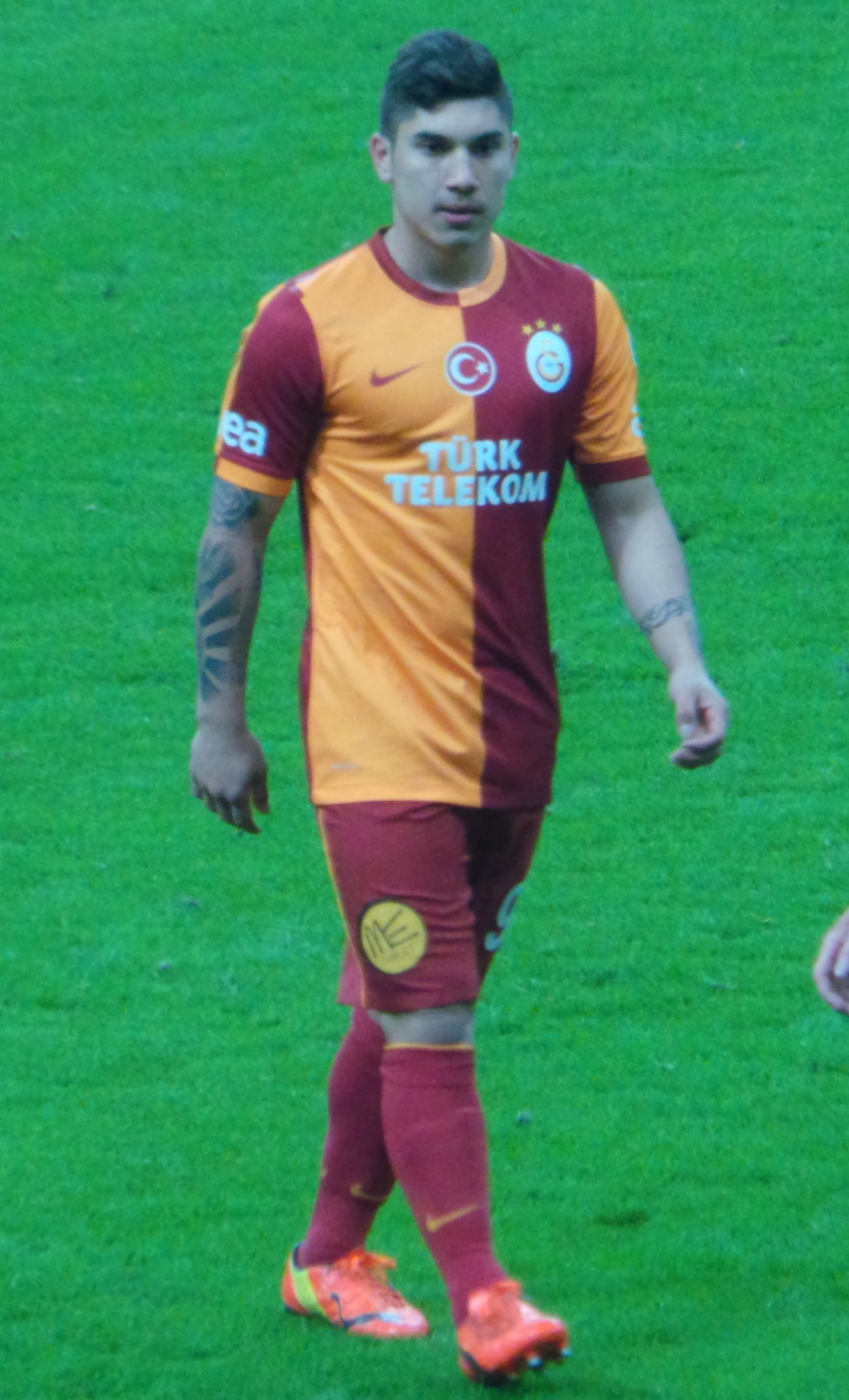 Lucas Ontivero Kayserispor